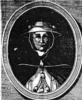 Portrait d'Hugues Aycelin Montaigut, Cardinal-prêtre de Sainte-Sabine